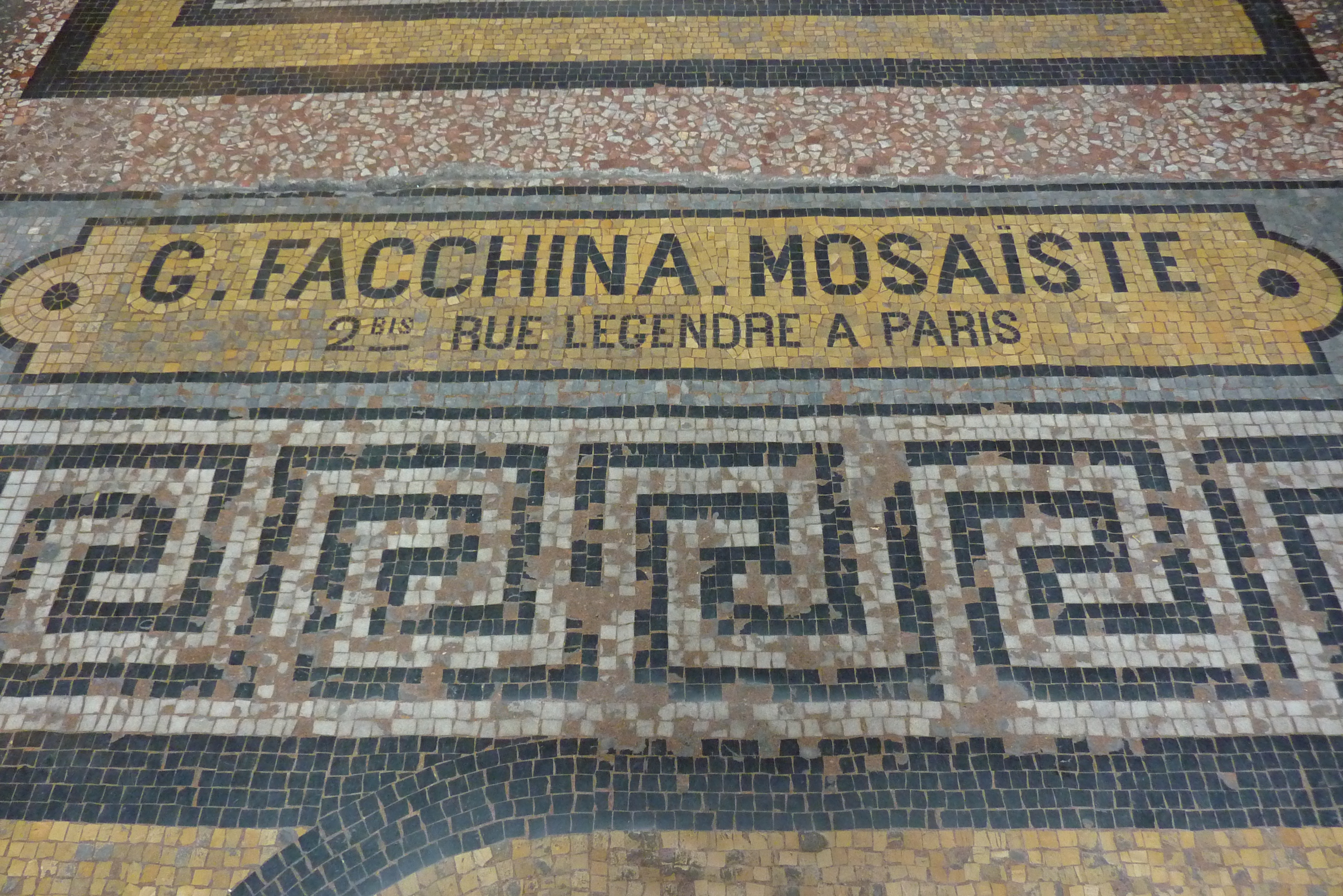 Mosaik in der Galerie Vivienne in Paris mit dem Namen des Mosaikkünstlers "G. FACCHINA"